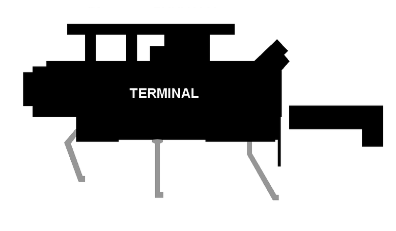 Terminal 1 del Aeropuerto de Acapulco